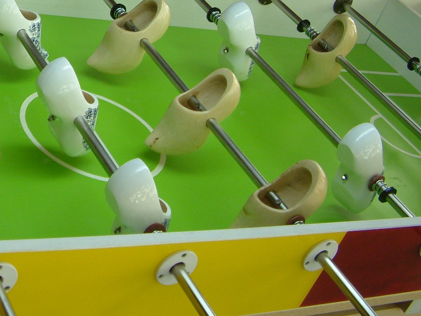 Van Abbemuseum, tafelvoetbalspel